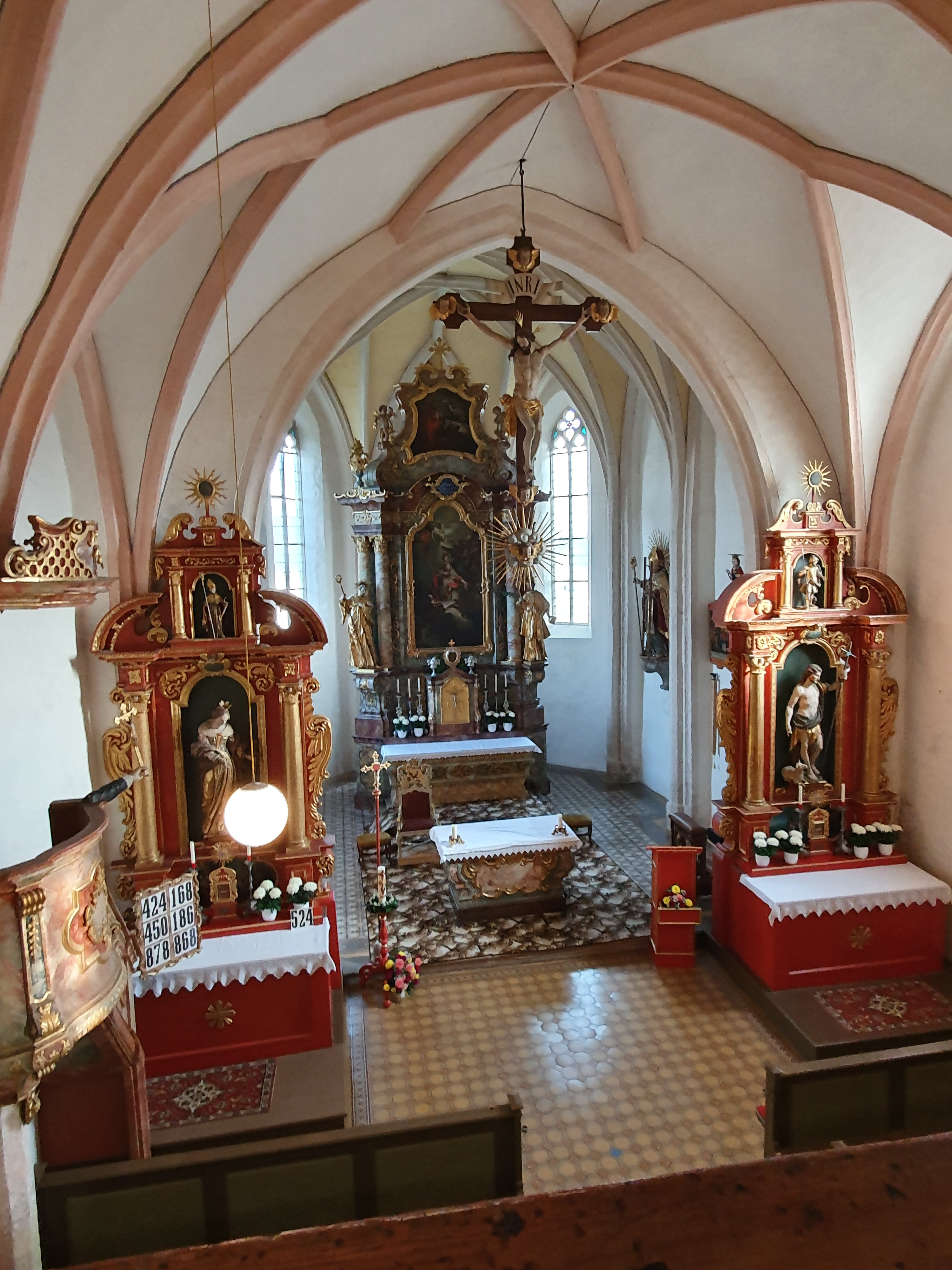 Langhaus der Filialkirche Untereching in St. Georgen an der Salzach